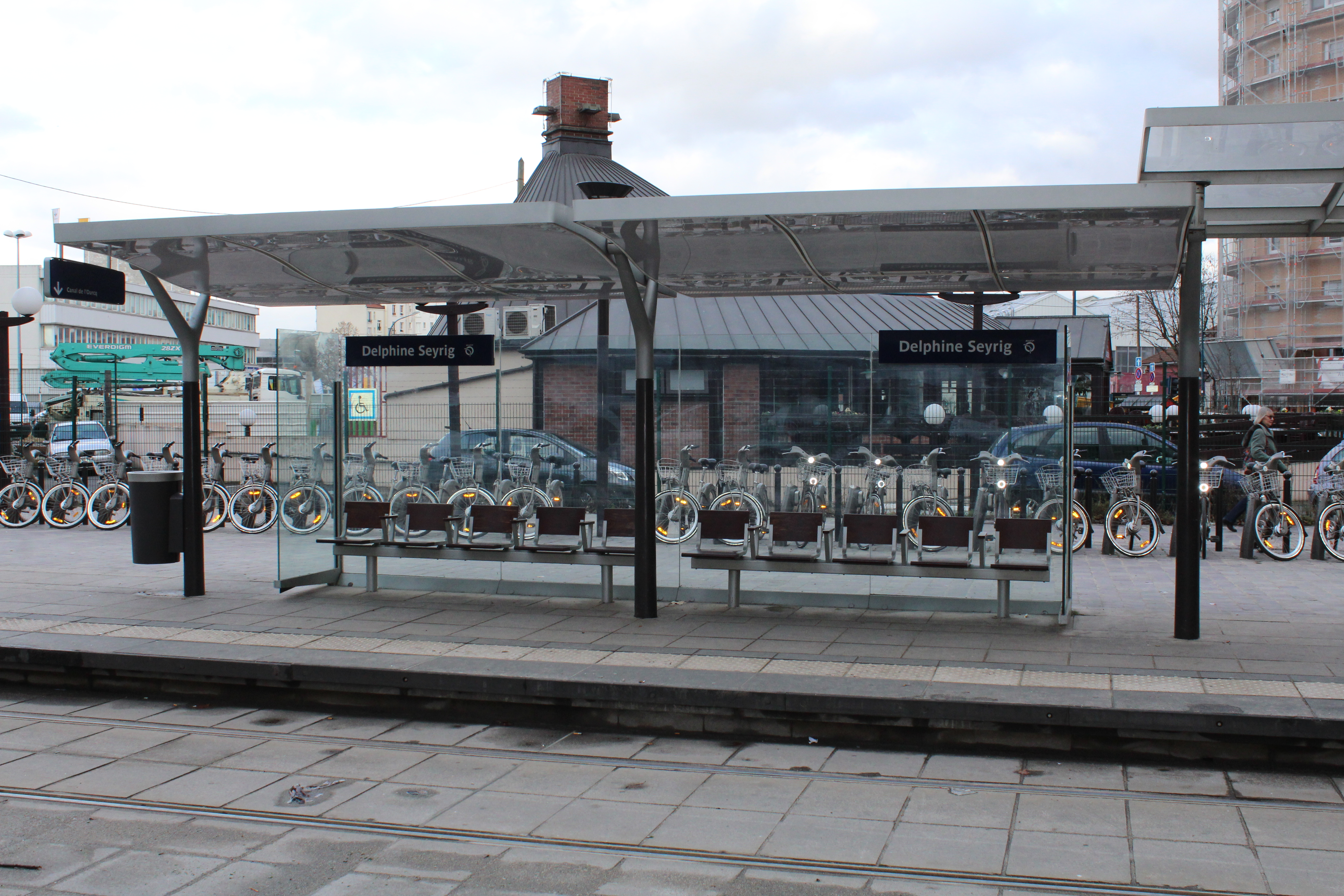 Station de tramway Delphine Seyrig de la ligne 3b du tramway d'Île-de-France